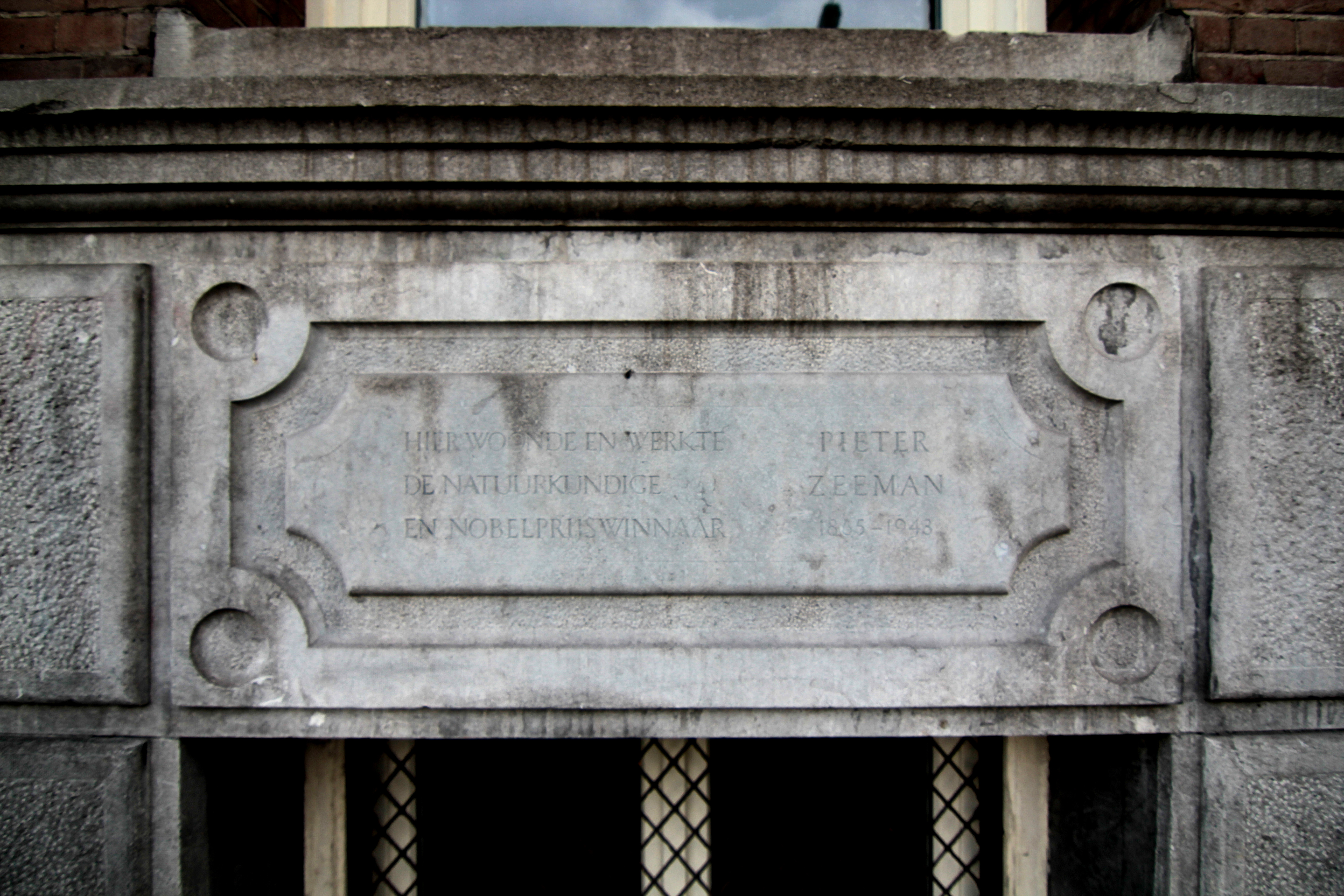 Gedenksteen op pand aan Stadhouderskade ter attentie van het gegeven dat Nobelprijswinnaar Pieter Zeeman alhier tussen 1885 en 1943 woonde en werkte